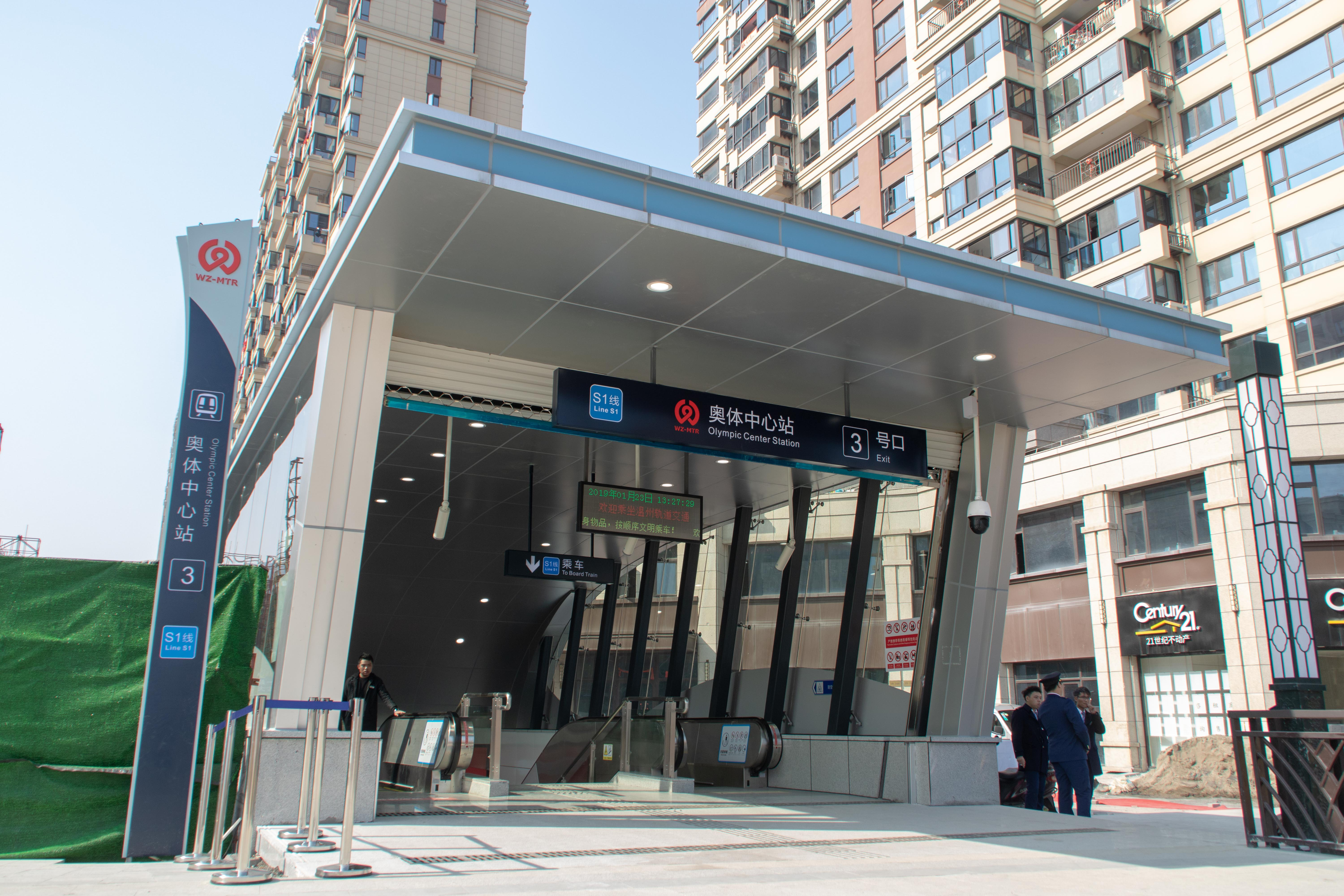 中文（中国大陆）: 奥体中心站3号出入口